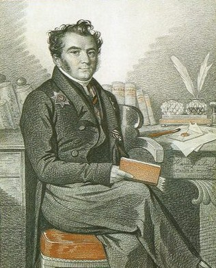 Дмитрий Гаврилович Бибиков (18.03.1791 - 22.02.1870).